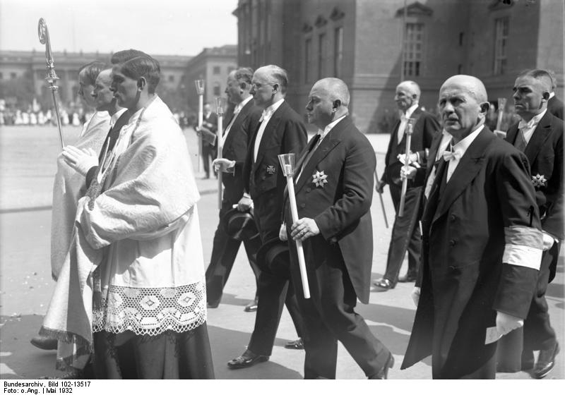 Die feierliche Fronleichnam-Prozession an der Hedwigskirche in Berlin ! Die Mitglieder der Reichsregierung im Prozessionszuge von rechts nach links: Reichspostminister Dr. Schätzel, Reichskanzler Dr. Brüning (Mitte) und Dr. Wirth.